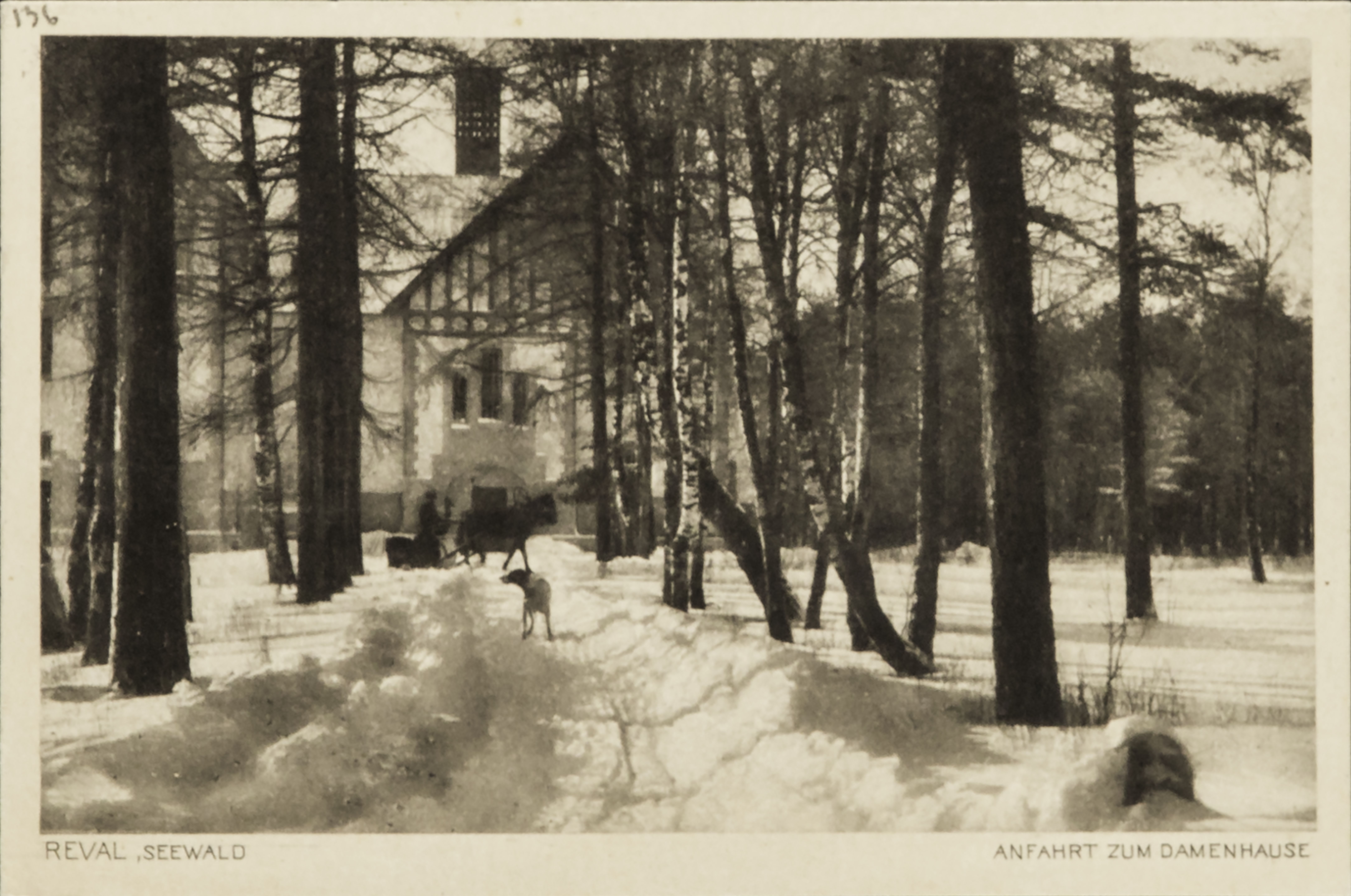 Seewald. Anfahrt zum Damenhaus (arhitekt Jacques Rosenbaum)